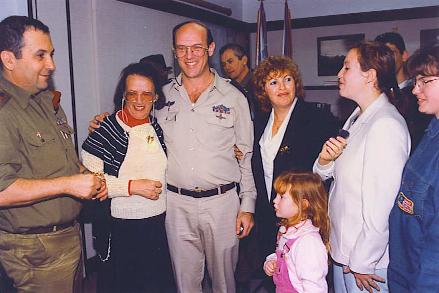 ראש המטה הכללי רב אלוף אהוד ברק מעניק דרגת תא"ל לאלכס אייל בנוכחות משפחתו, דצמבר 1991.